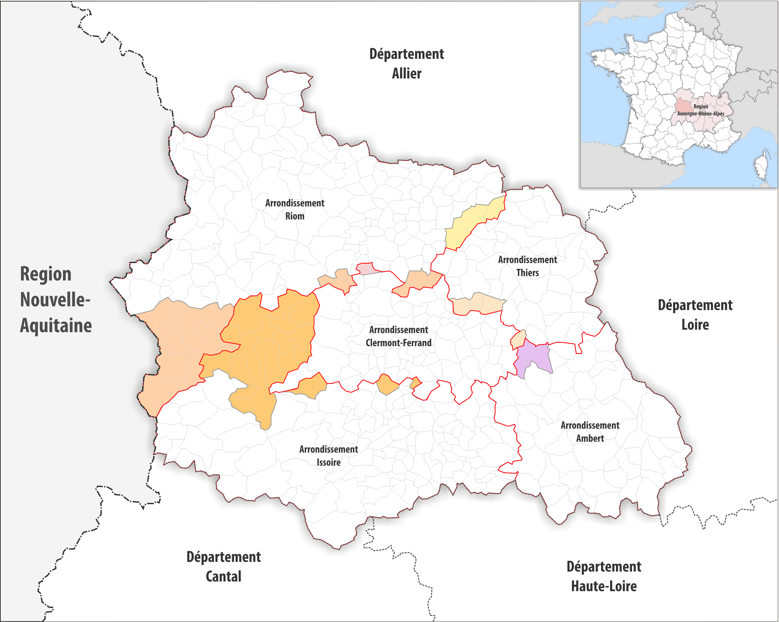 Arrondissements Anpassungen auf 2017 im Departement Puy-de-Dôme